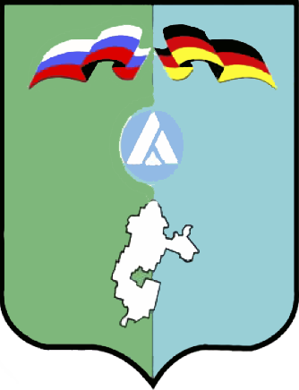 Герб Азовского немецкого национального района